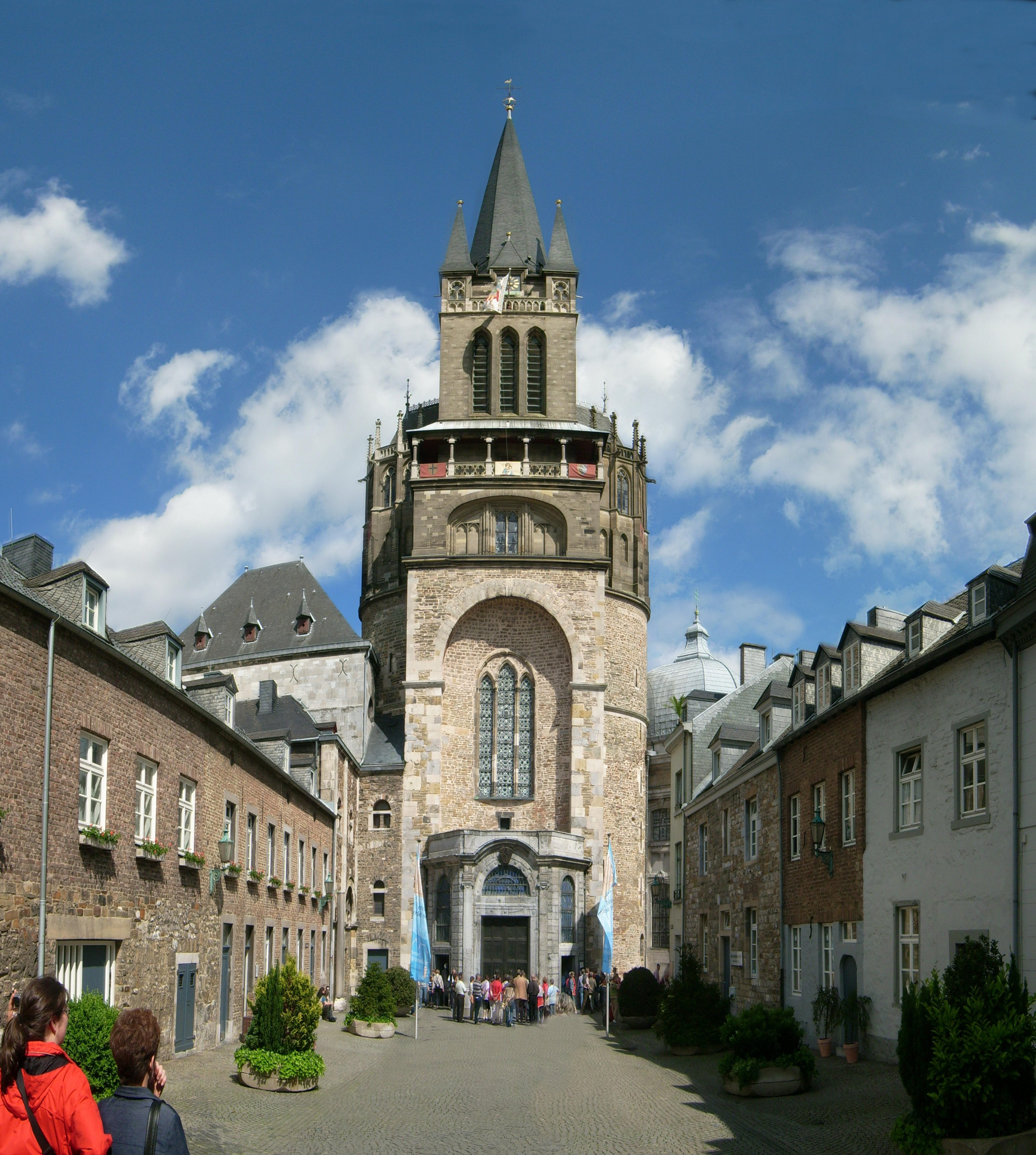 Portal des Aachener Doms